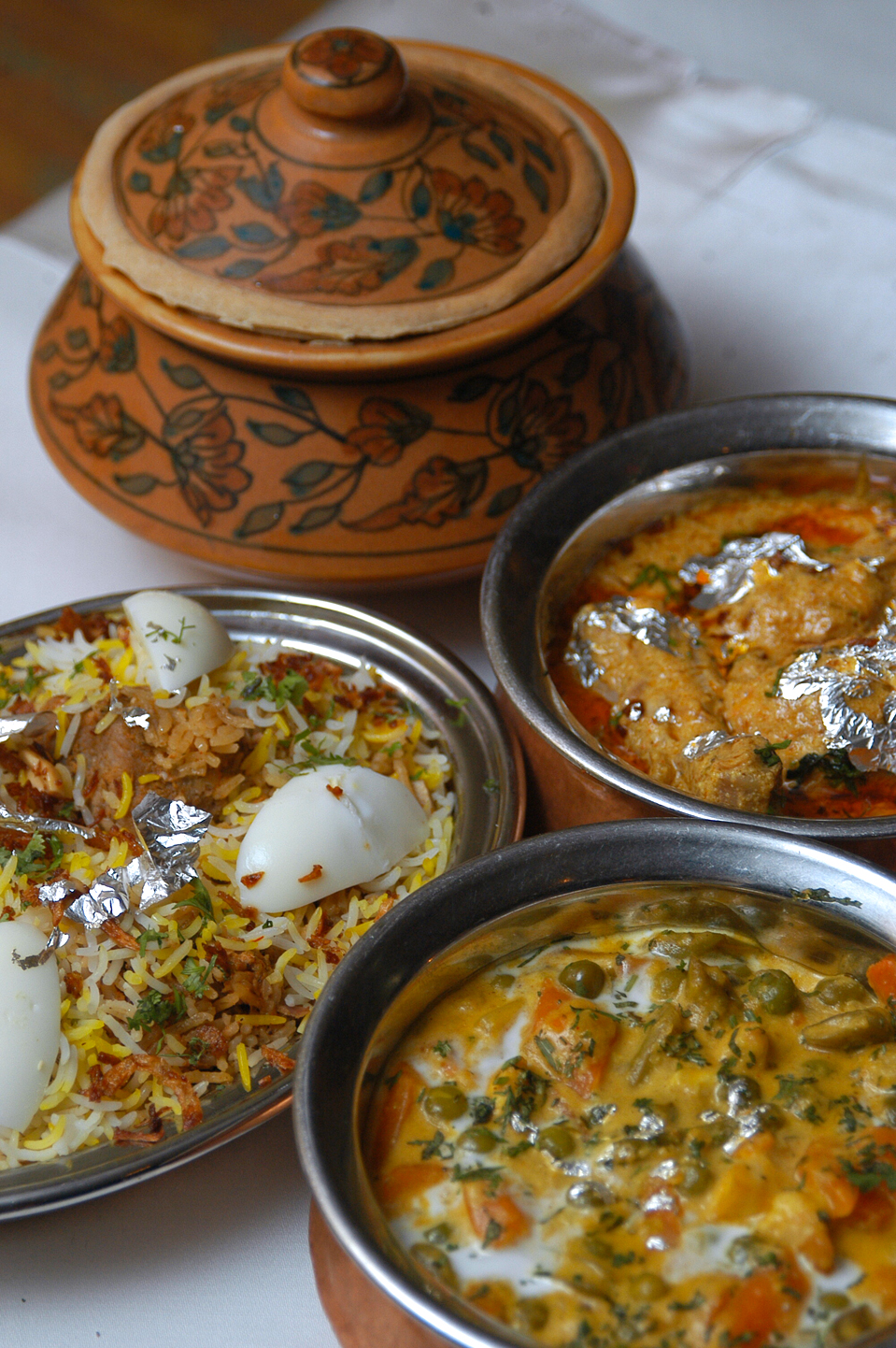 Hyderabadi Biryani